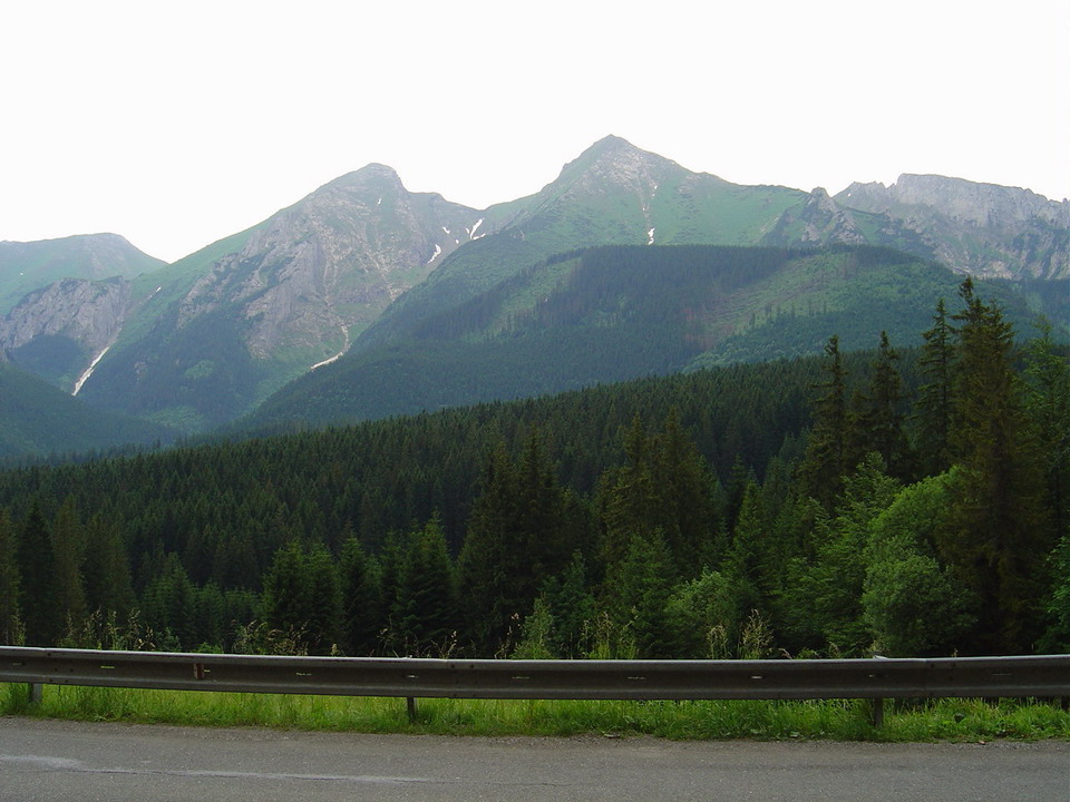 Zdiarska vidla and Havran from over Zdiar